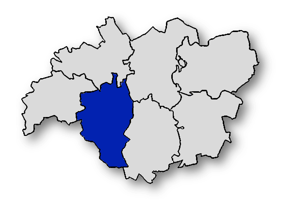 Mapa powiatu pułtuskiego z uwzględnieniem gminy Winnica